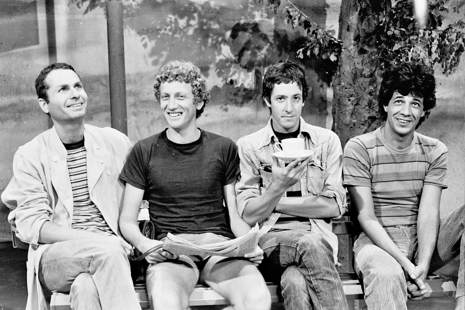 מנחי התוכנית זהו זה! השנים הראשונות מתי סרי, גידי גוב, מוני מושונוב ושלמה בר-אבא